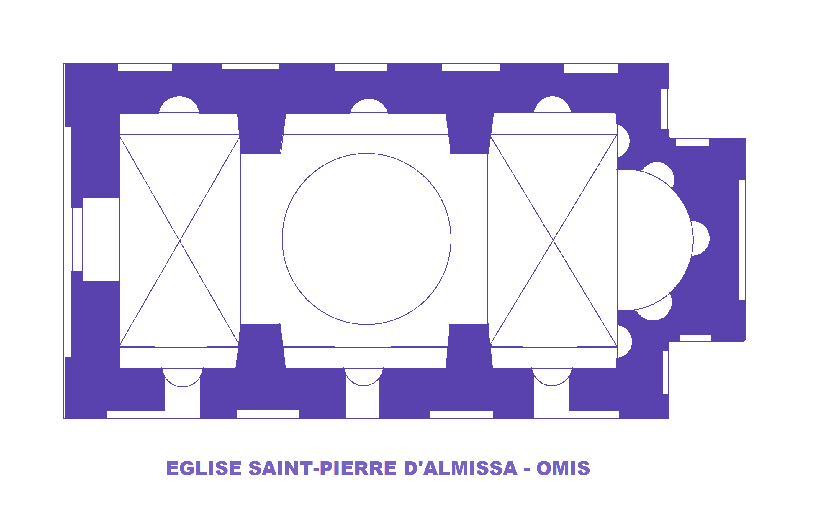 Eglise Saint-Pierre d'Almisa - Omis